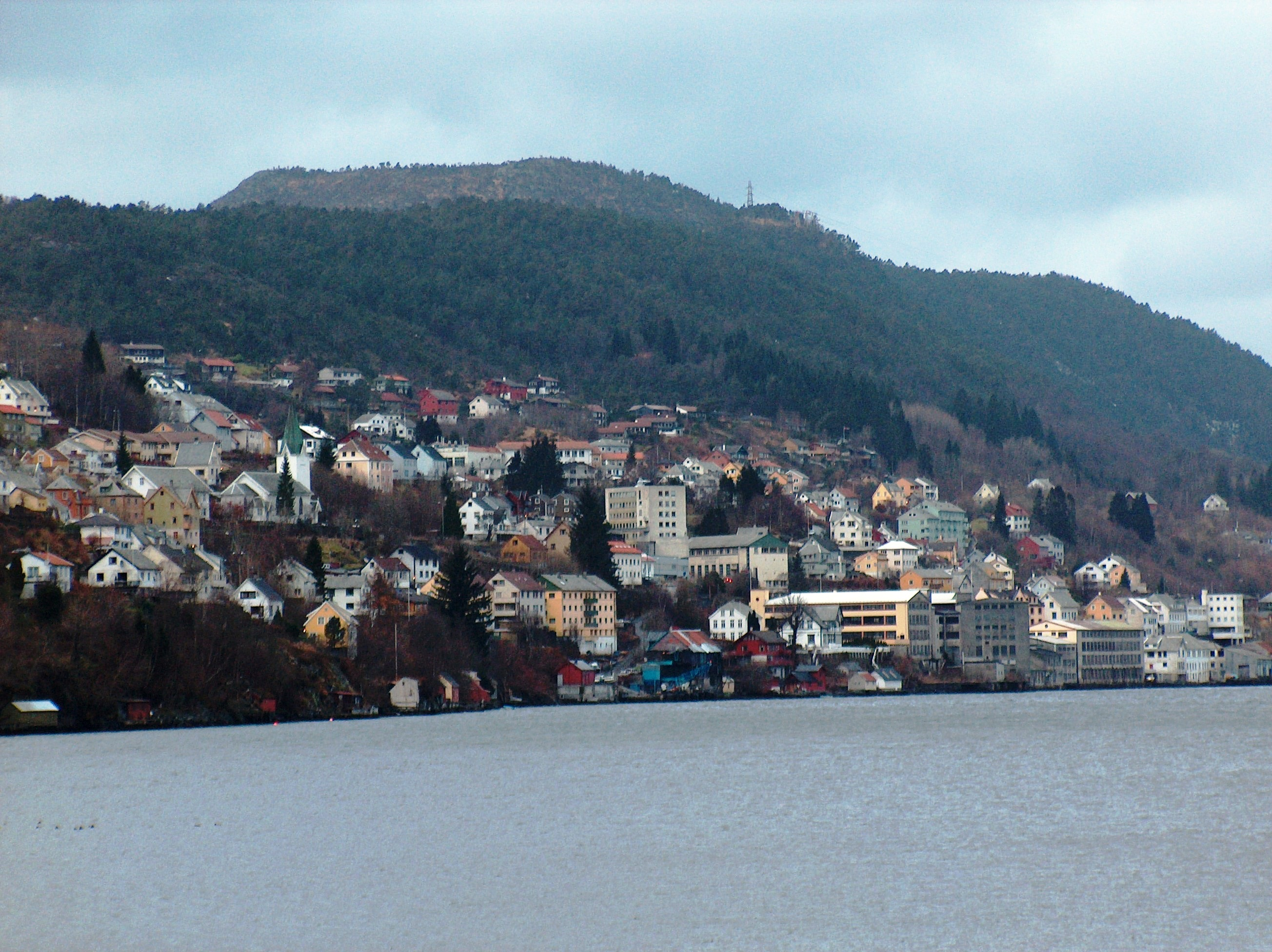 Ytre Arna, Bergen in Norway.